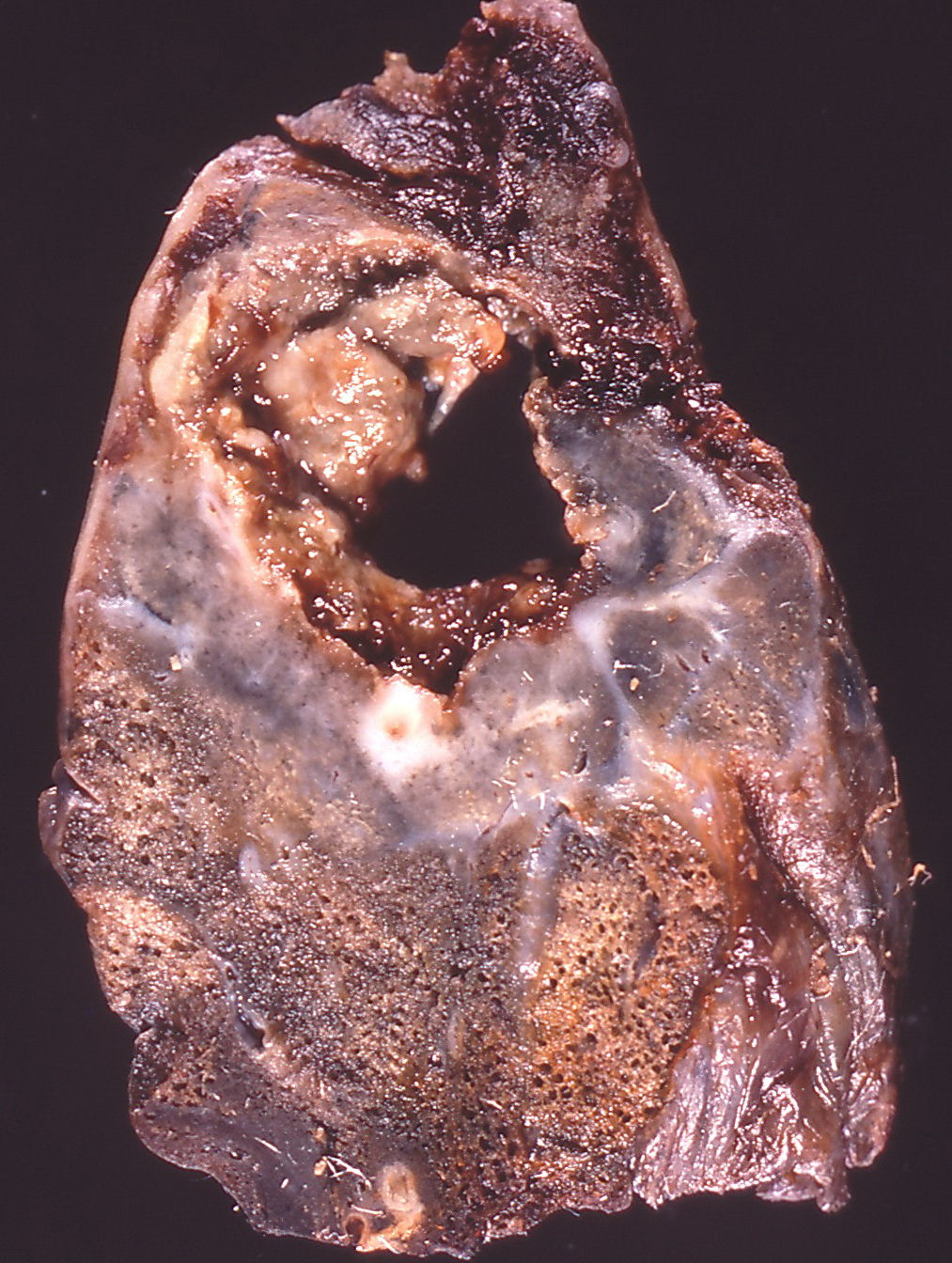 Lung abscess